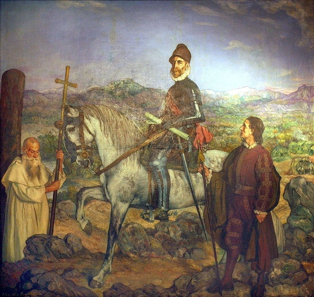 La pintura representa al Conquistador de Chile. Fue encargado al pintor español por la colectividad de ese país residente en Chile, al cumplirse el Cuarto Centenario de la fundación de Santiago. En el costado izquierdo tiene una nota que dice “Creo que así fue Pedro de Valdivia”. Zuloaga, de gran precio internacional, se especializó en temas costumbristas castellanos y fue un retratista de renombre.